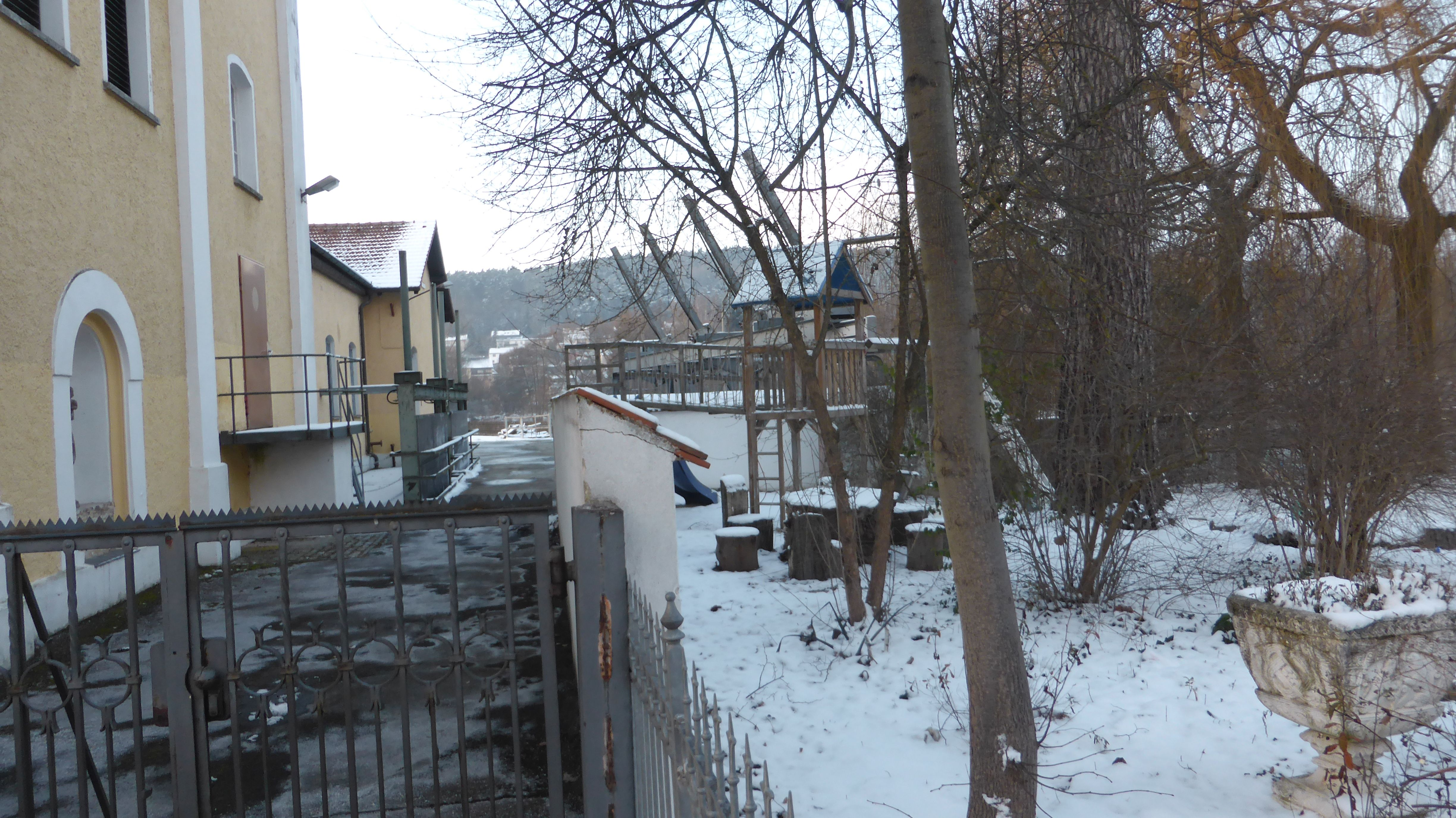 Altes Schloss Ettmannsdorf - E-Werk